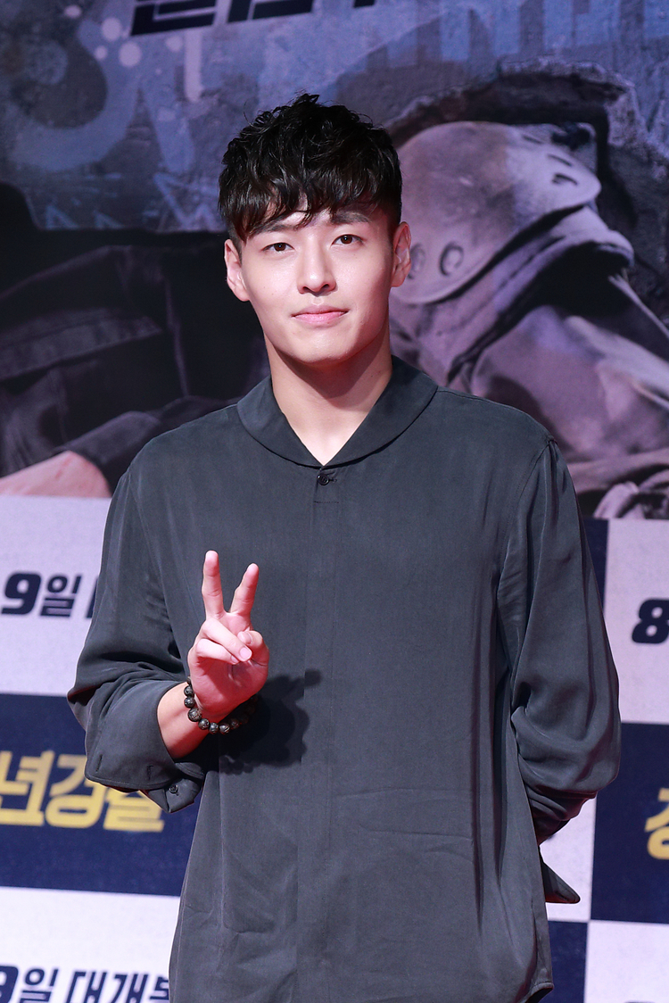 170807 청년경찰 VIP 시사회